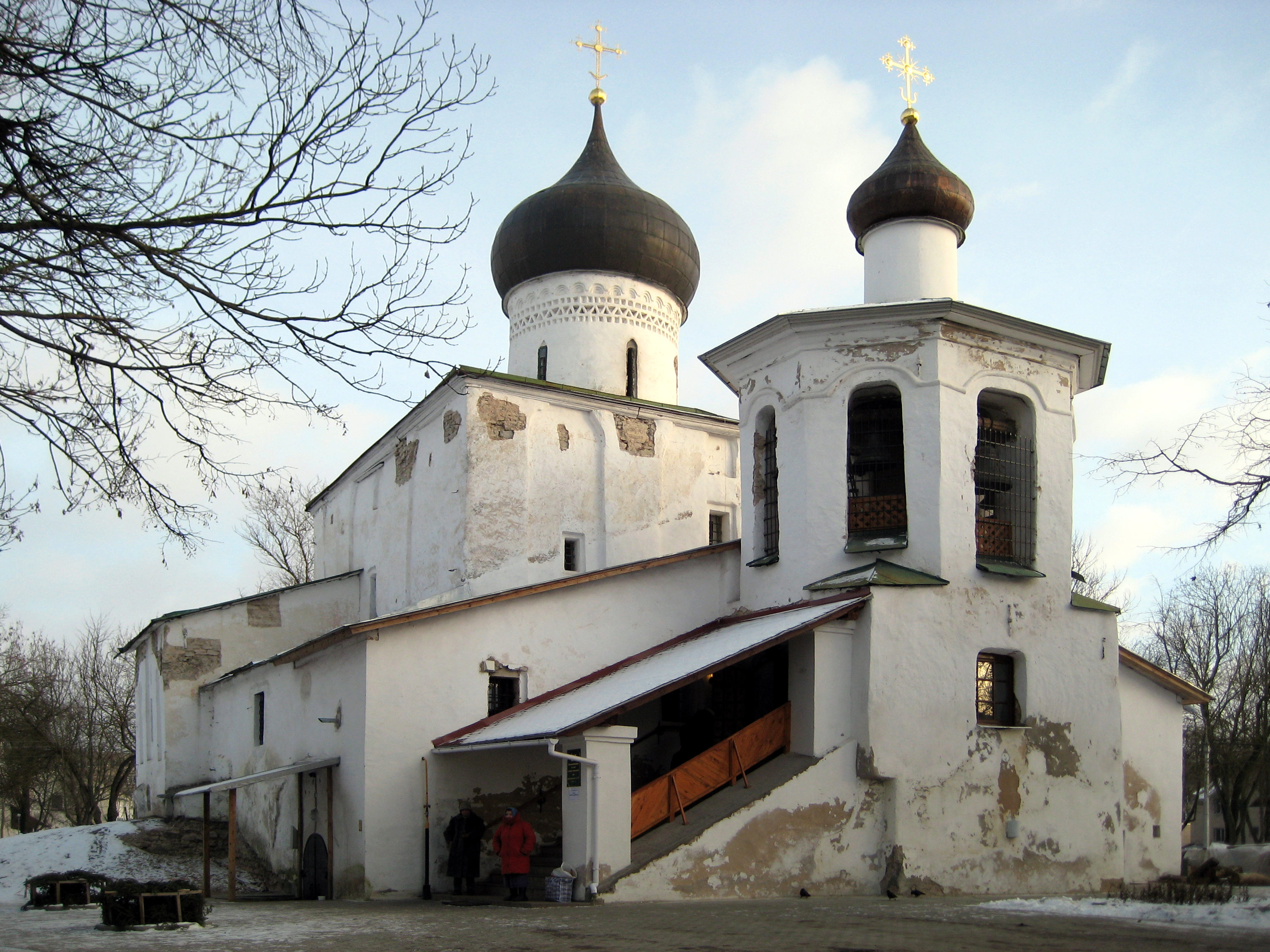 Псков. Церковь Василия на Горке. Church of St. Basil "na Gorke" (on the Hill)